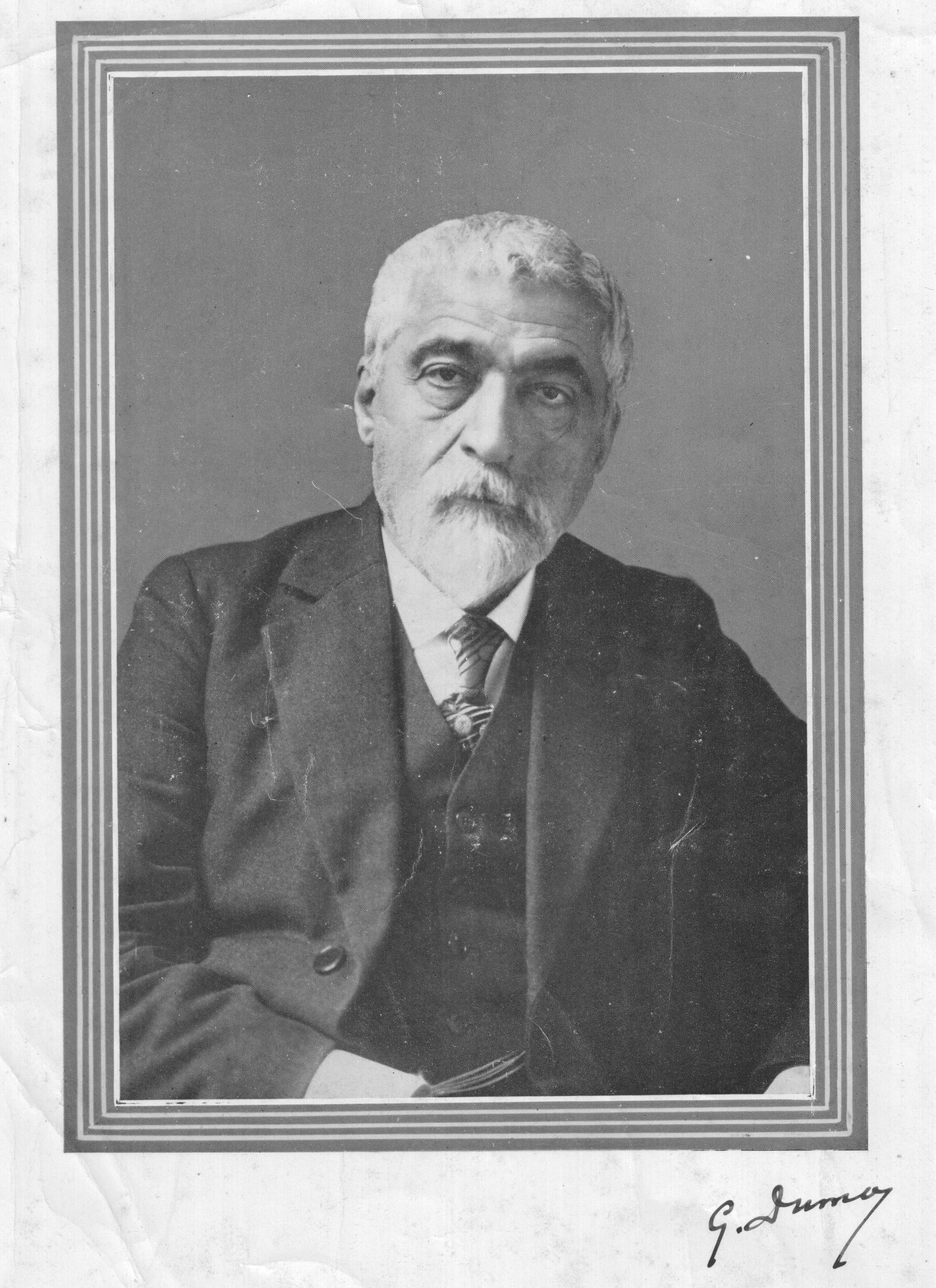 portrait de Georges Dumas